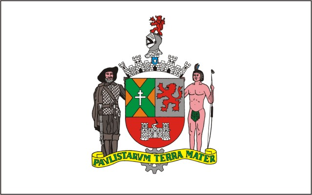 Bandeira do municipio de Sao Bernardo do Campo